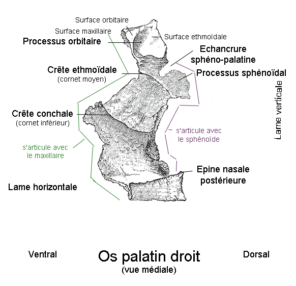 Os palatin. Vue médiale. Anatomie humaine